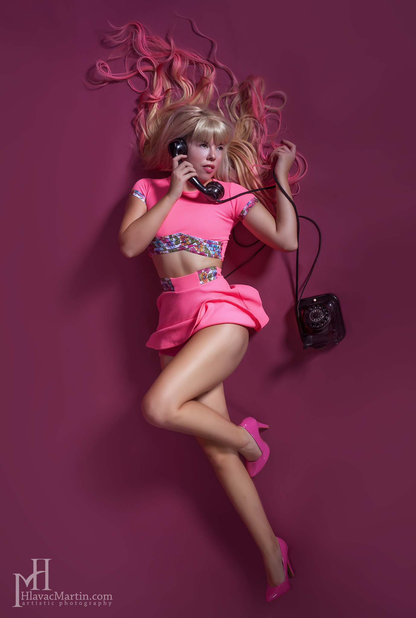 Personality rights warningAlthough this work is freely licensed or in the public domain, the person(s) shown may have rights that legally restrict certain re-uses unless those depicted consent to such uses. In these cases, a model release or other evidence of consent could protect you from infringement claims.